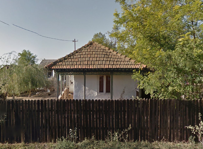 O casă veche din localitatea Constantin Gabrielescu comuna Bordei Verde